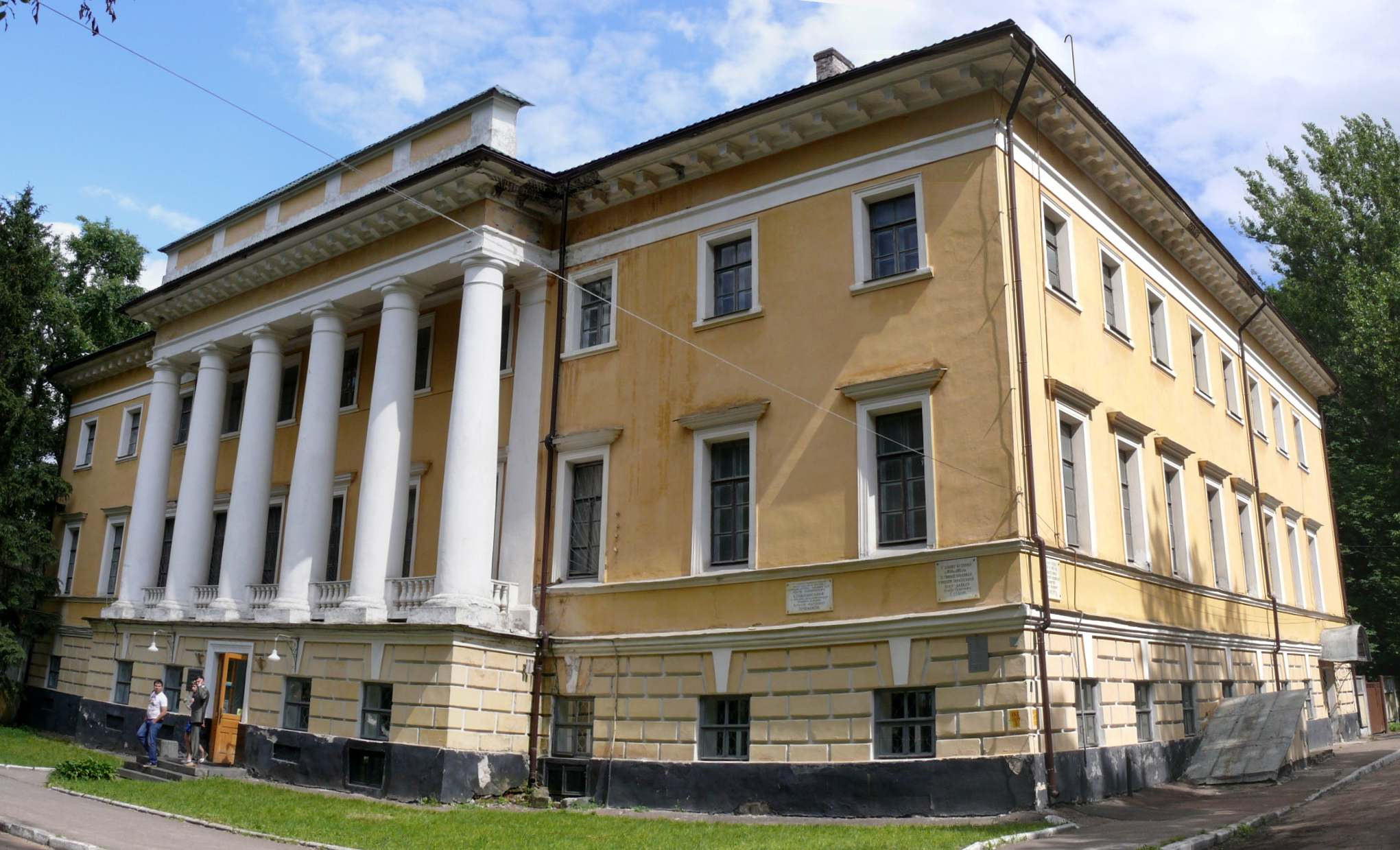 Чегніговський обласний історичний музей. Будинок колишньої чернігівської чоловічої гімназії 1808-1821 р.р.